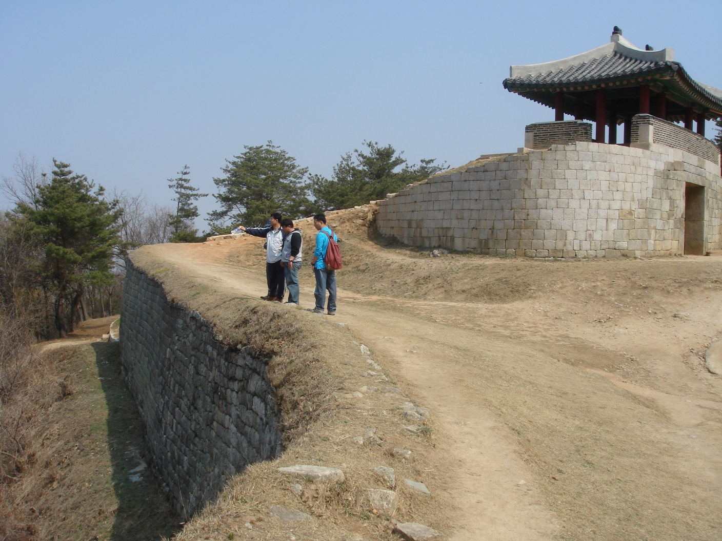 상당산성